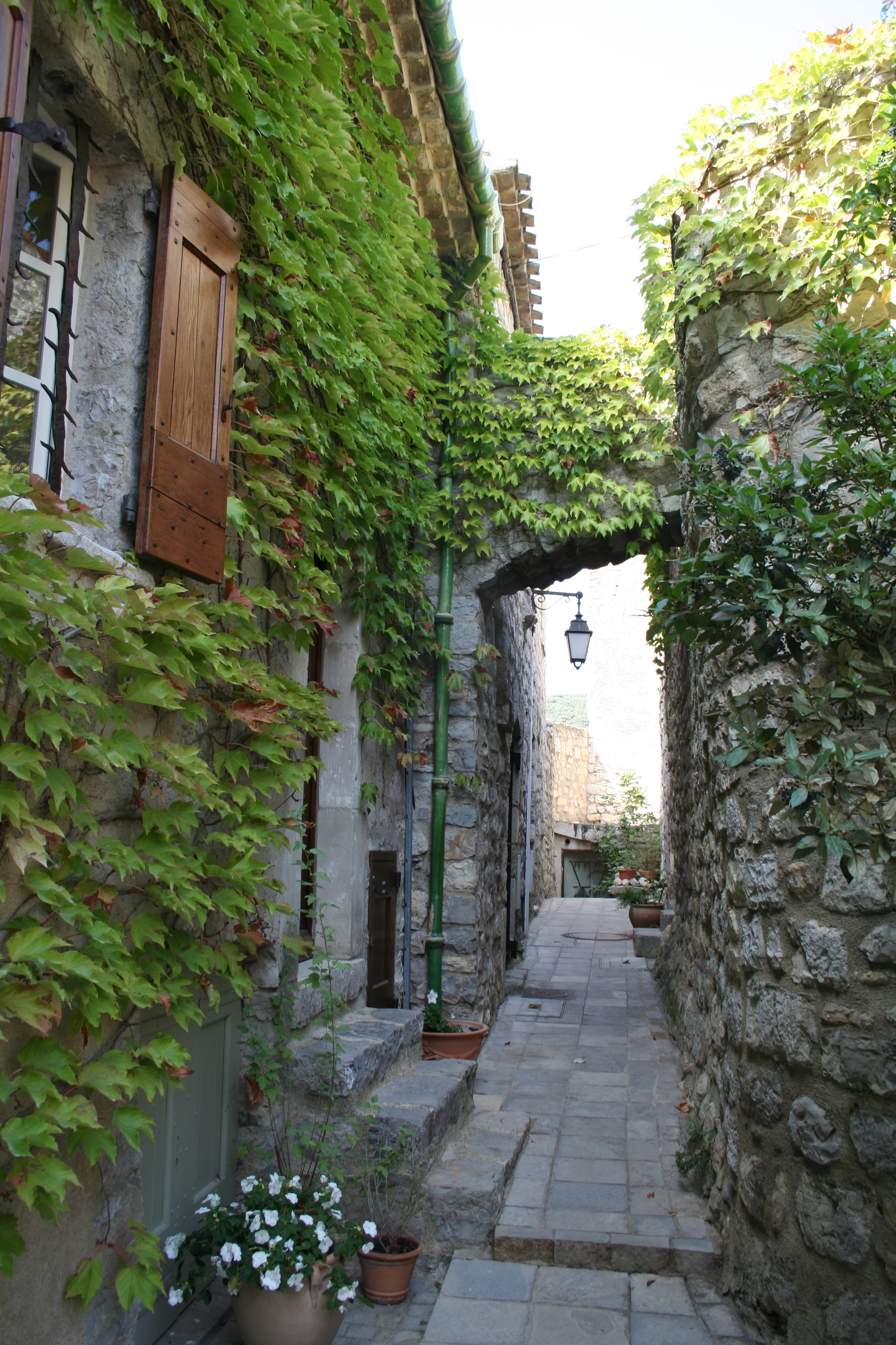 Les Matelles (Hérault) - Rue haute.